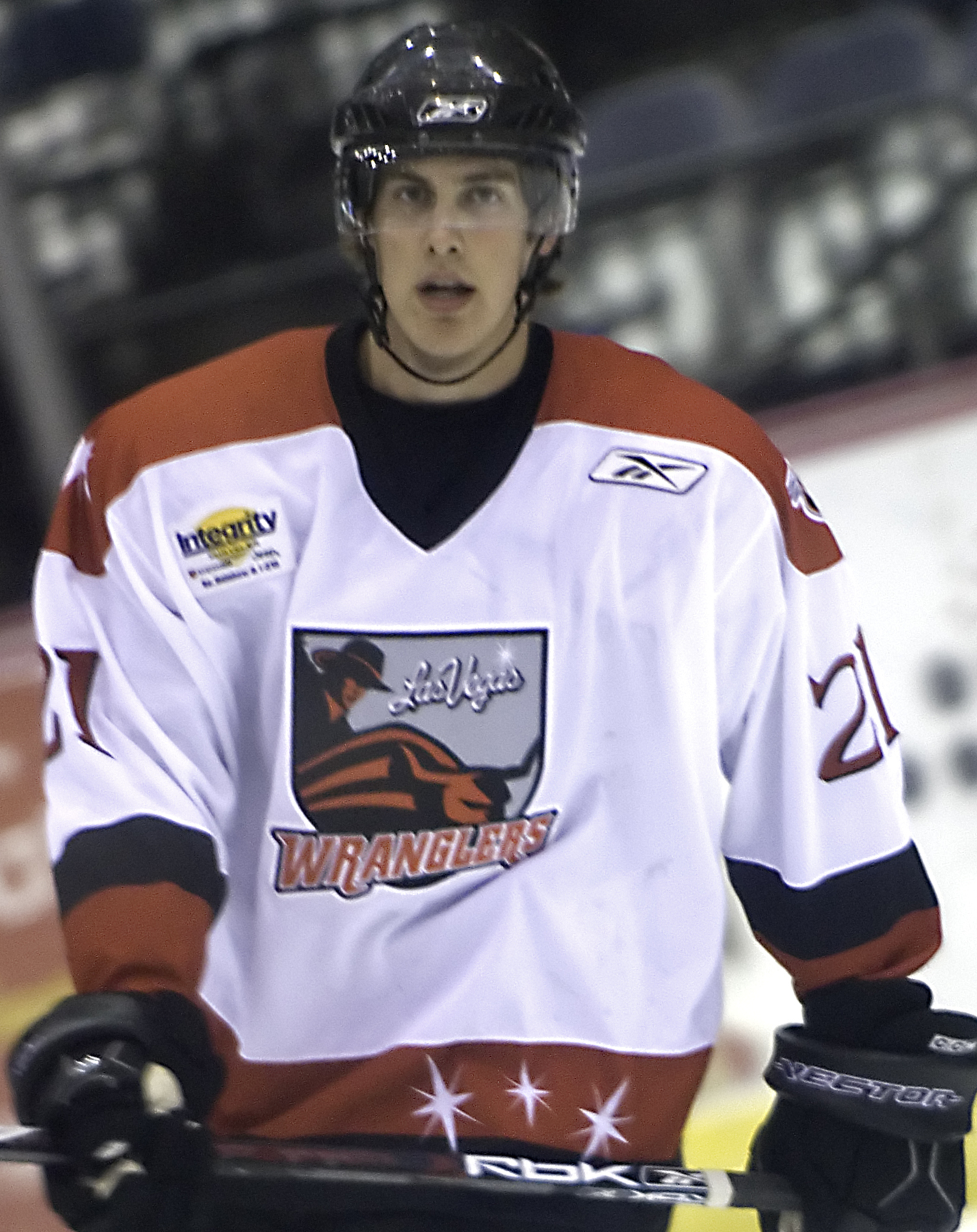 Aki Seitsonen